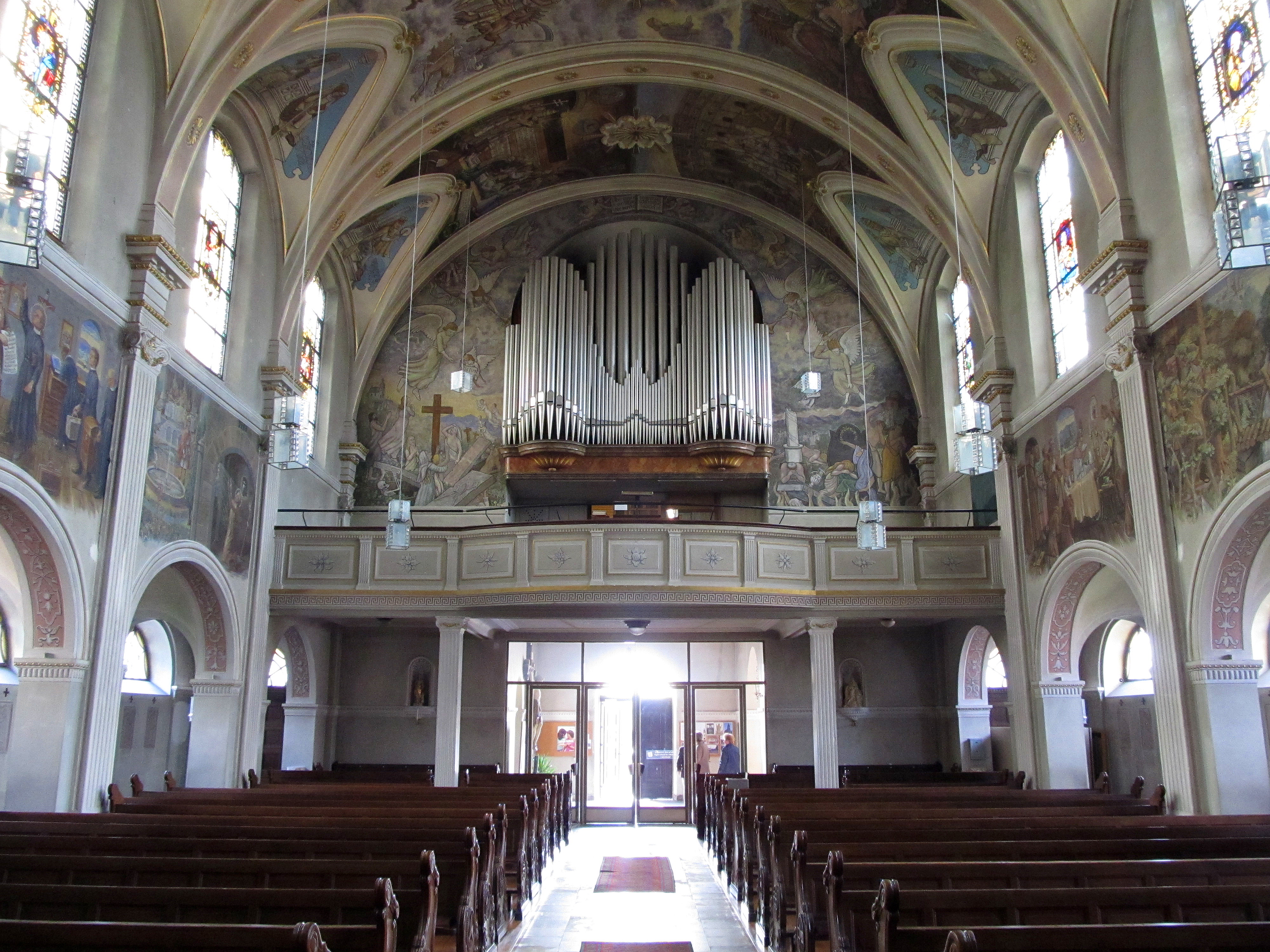 Blick ins Innere der katholischen Pfarrkirche Hl. Dreifaltigkeit in Wiebelskirchen, einem Stadtteil von Neunkirchen (Saar), Saarland